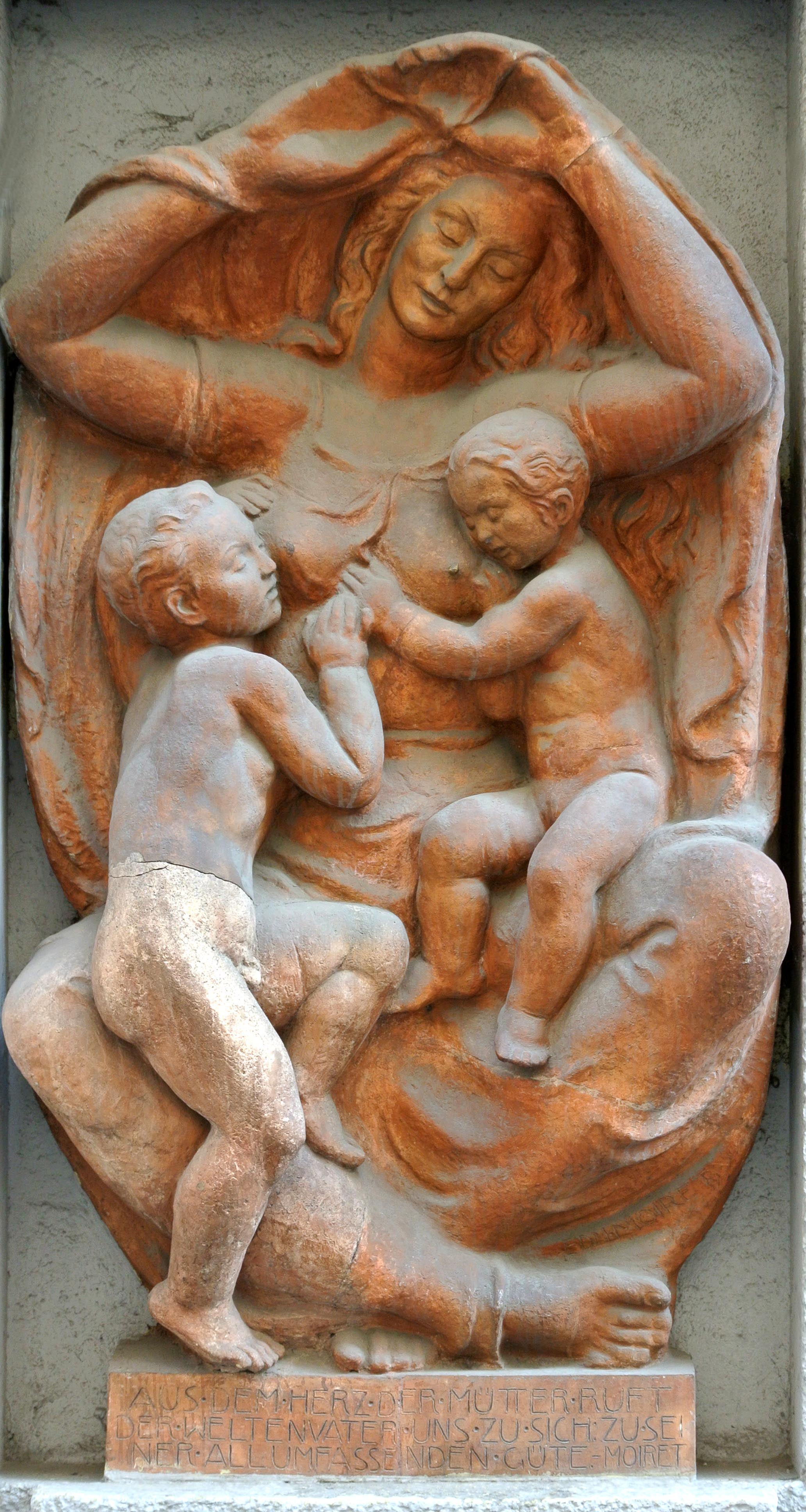 Moiret Edmund (Ödön), , * 2.3.1883 Budapest, † 12.12.1966 Wien. Bildhauer und Zeichner. Fassadeschmuck in Wien-Innere Stadt, Färbergasse Nr.8. Inschrift: AUS DEM HERZ DER MÜTTER RUFT DER WELTENVATER UNS ZU SICH: ZU SEINER ALLUMFASSENDEN GÜTE. MOIRET